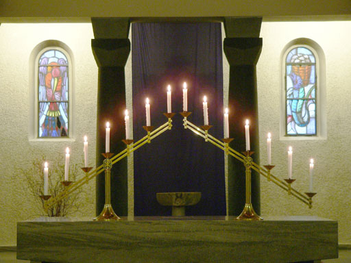 Zwei Kerzenleuchter bei einer Karmette auf einem Altar